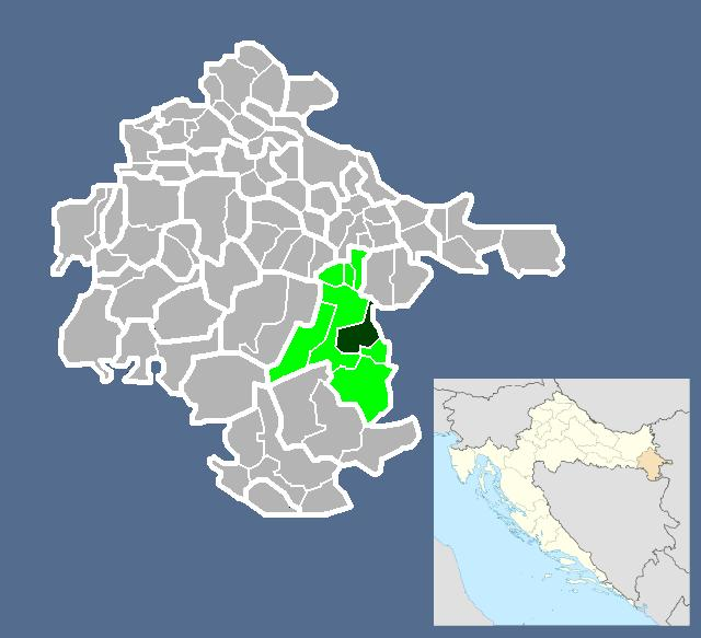 Српски (ћирилица): Насеље Подграђе у Општини Нијемци.